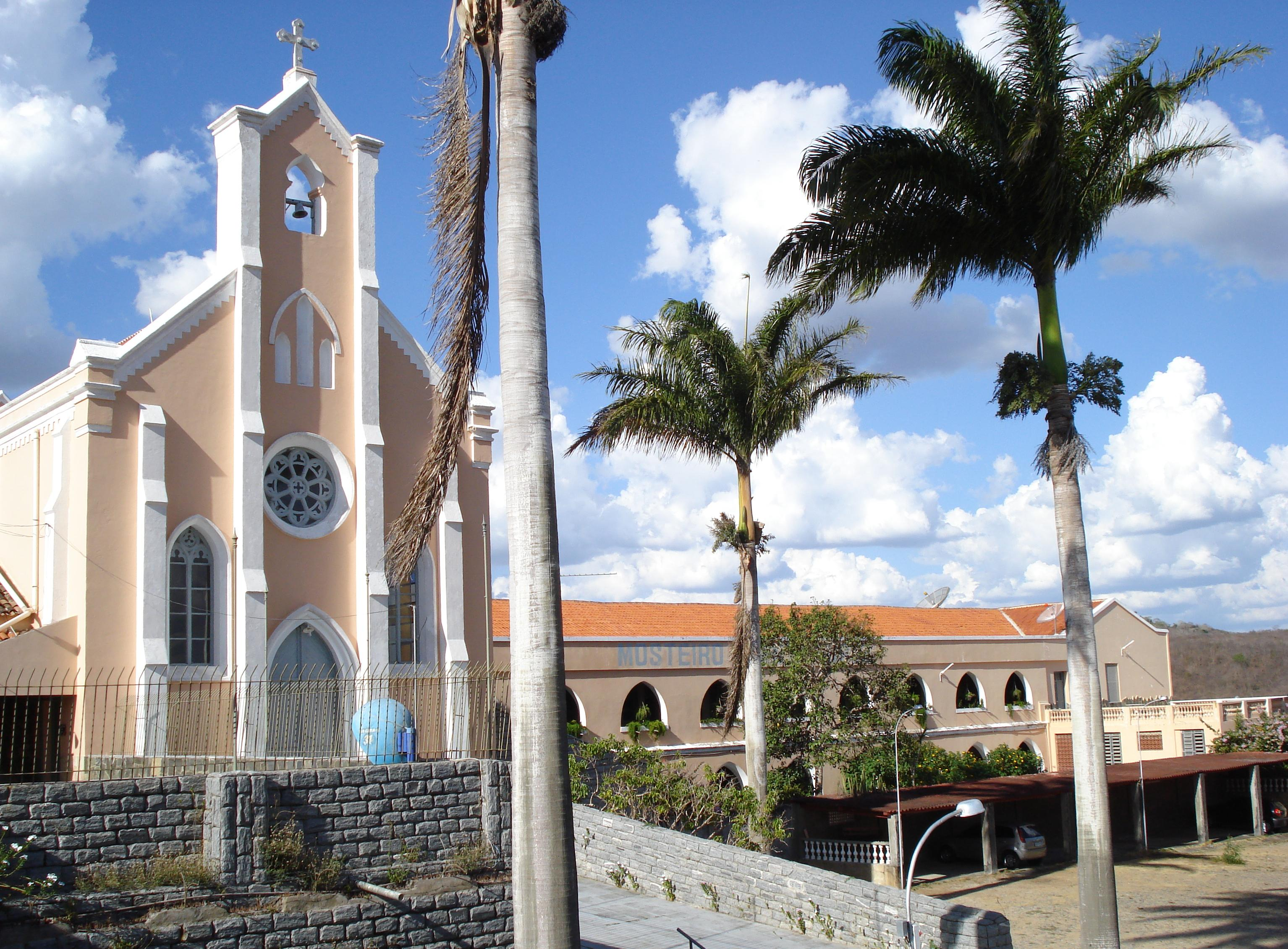 Capela de São José e Mosteiro na Serra do Estêvão, distrito de Dom Maurício, Quixadá, Ceará, Brasil.